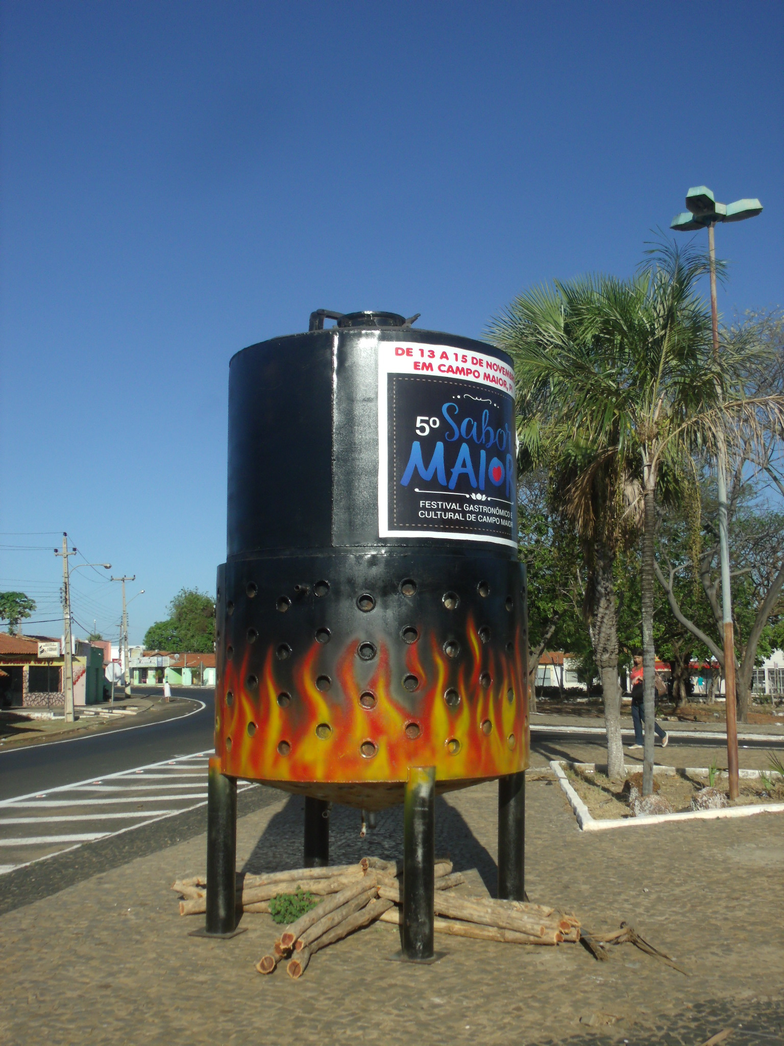 Panelão de divulgação do 5º Sabor Maior de Campo Maior, no Piauí